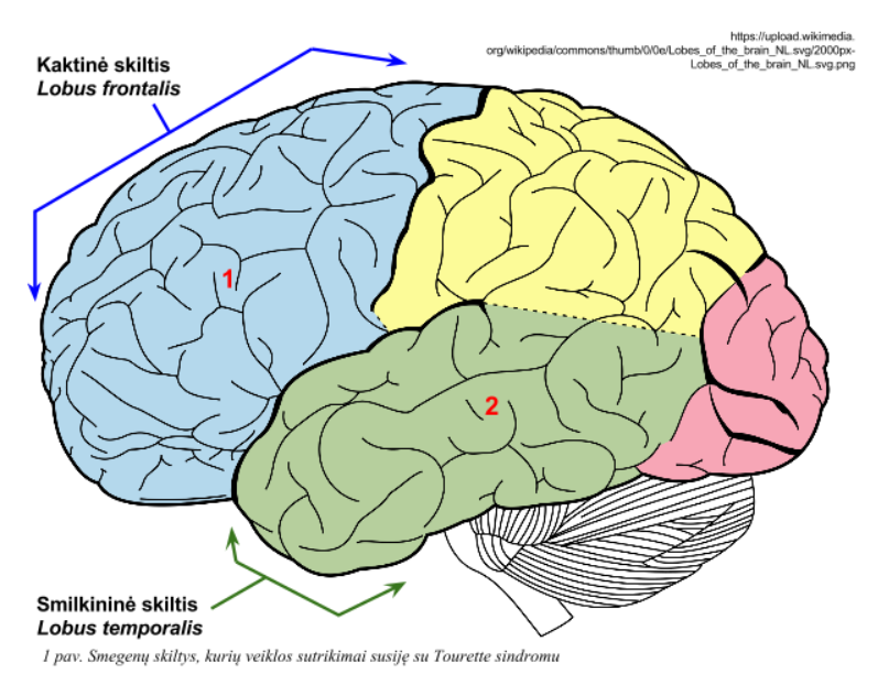 Kaktinė ir smilkininė smegenų skiltys